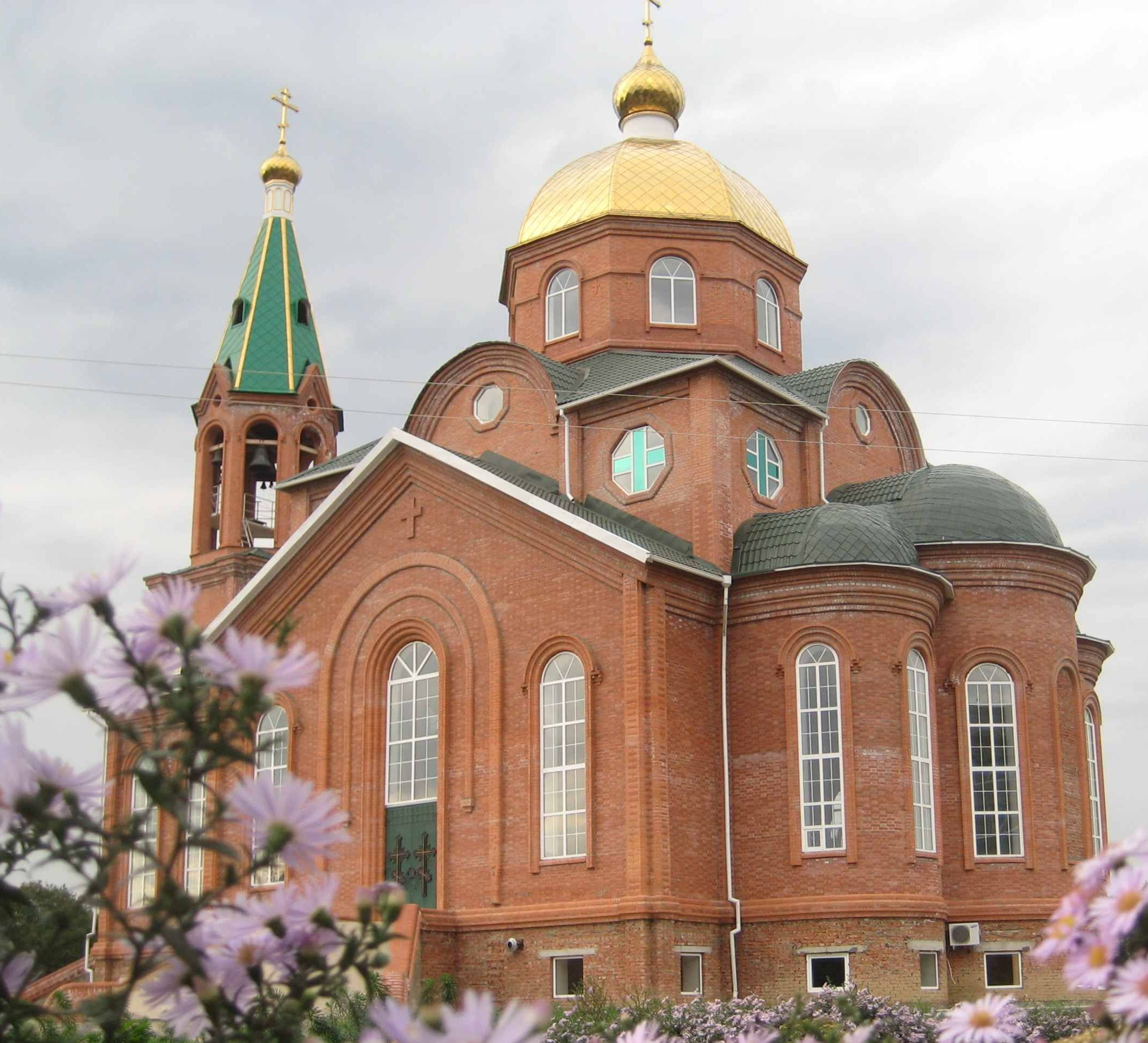 Iglesia Sviato-Troitski, Gulkévichi, Krasnodar, Rusia.